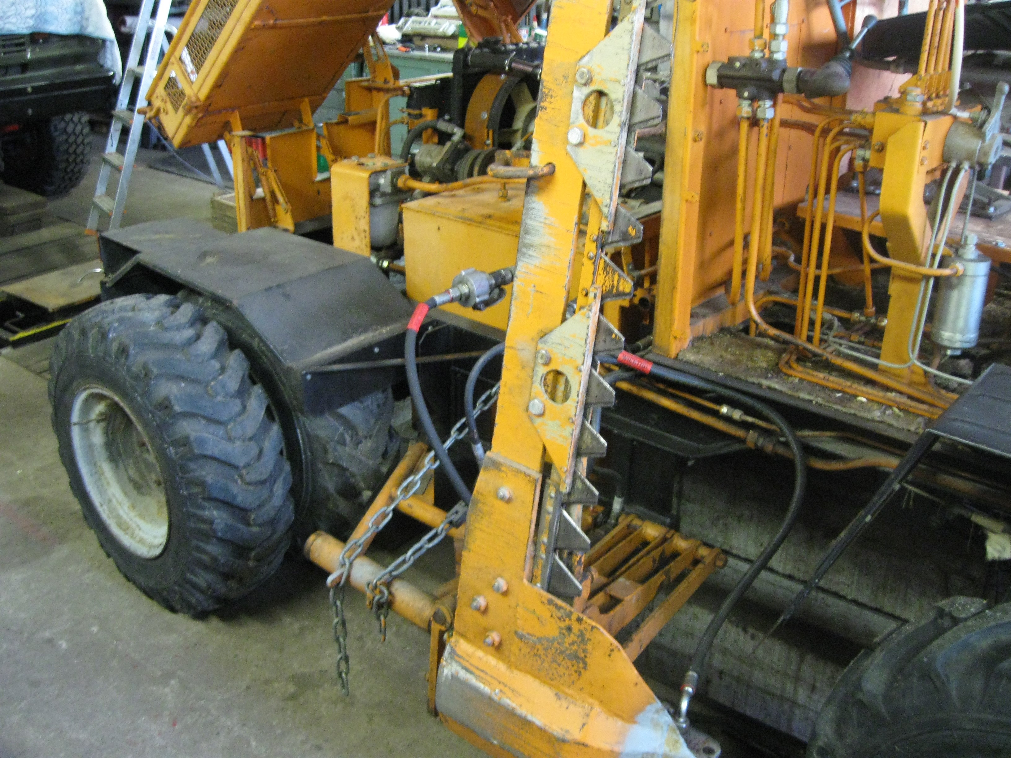 Doppelklingenmähwerk